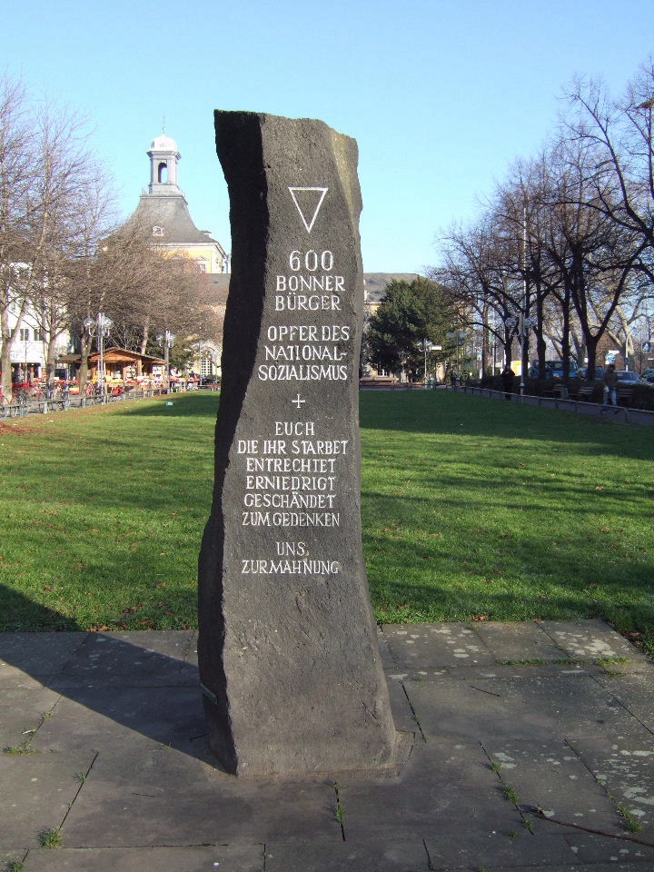 Mahnmal für die Bonner Opfer des Nationalsozialismus errichtet: 1950 (Hofgarten) Standort: Kaiserplatz (seit 1997) Inschrift: 600 Bonner Bürger Opfer des National- sozialismus + EUCH DIE IHR STARBET ENTRECHTET ERNIEDRIGT GESCHÄNDET ZUM GEDENKEN UNS ZUR MAHNUNG Auf der Rückseite des Mahnmales befindet sich eine Bronzetafel mit folgender Inschrift: Zu den tausenden ermordeten und überlebenden Opfern der nationalsozialistischen Gewaltherrschaft im heutigen Bonn zählen sowohl deutsche als auch ausländische Frauen, Männer und Kinder. Opfer waren alle, die aus weltanschaulichen, religiösen, ethnisch-rassistischen, sozialen und medizinischen, sowie lesbischer und homosexueller Orientierung verfolgt wurden. Bonn 1997